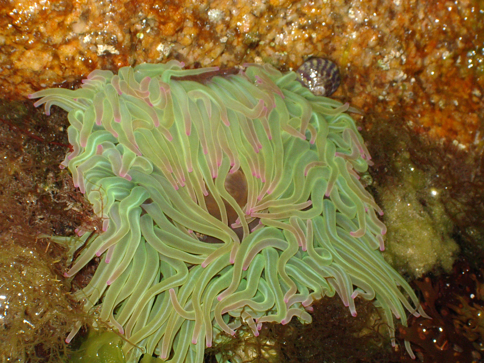 La photographie en couleur d'une anémone marine